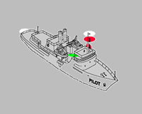 Navigation light /Luces de navegación